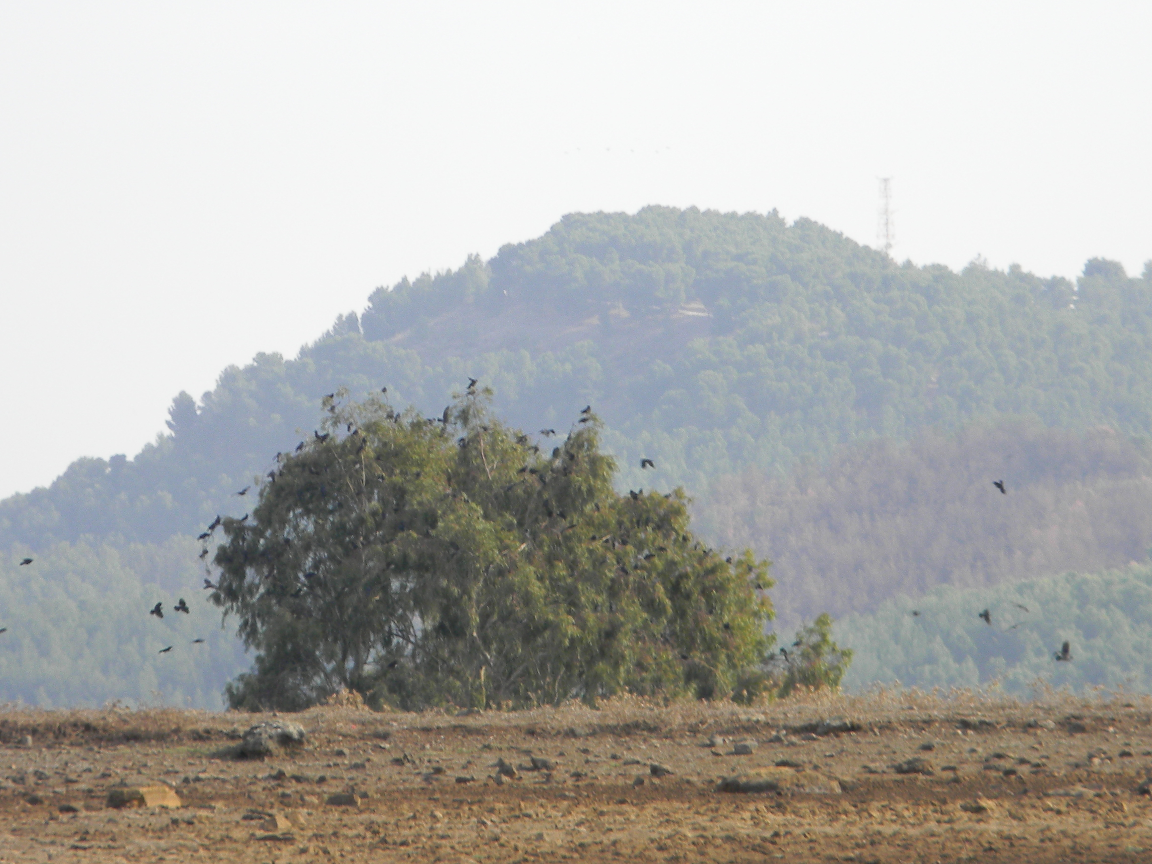 עורבים מקננים בקדיתא על רקע הר כנען.